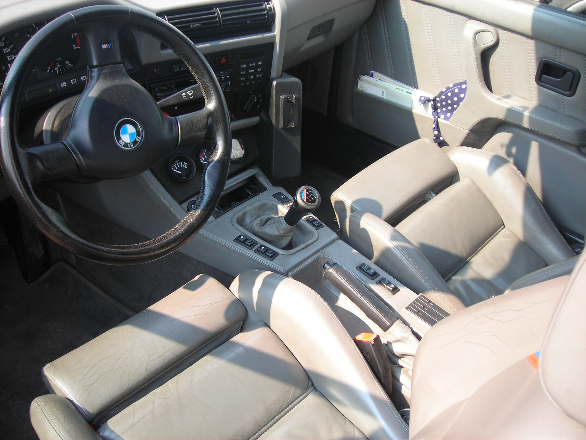 BMW M3 e30 cabrio, wyprodukowany 1991-04, wnętrze. Zlot BMW M Power Club w Toruniu.